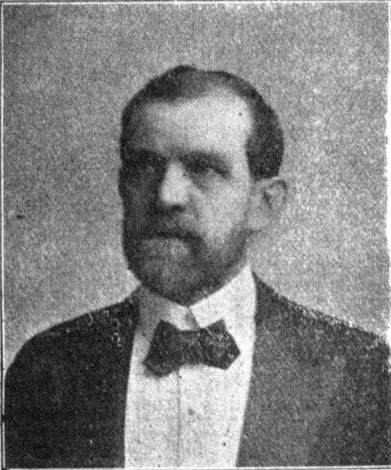 Österreichischer Politiker, Reichsratswahl 1907, Name siehe Dateiname